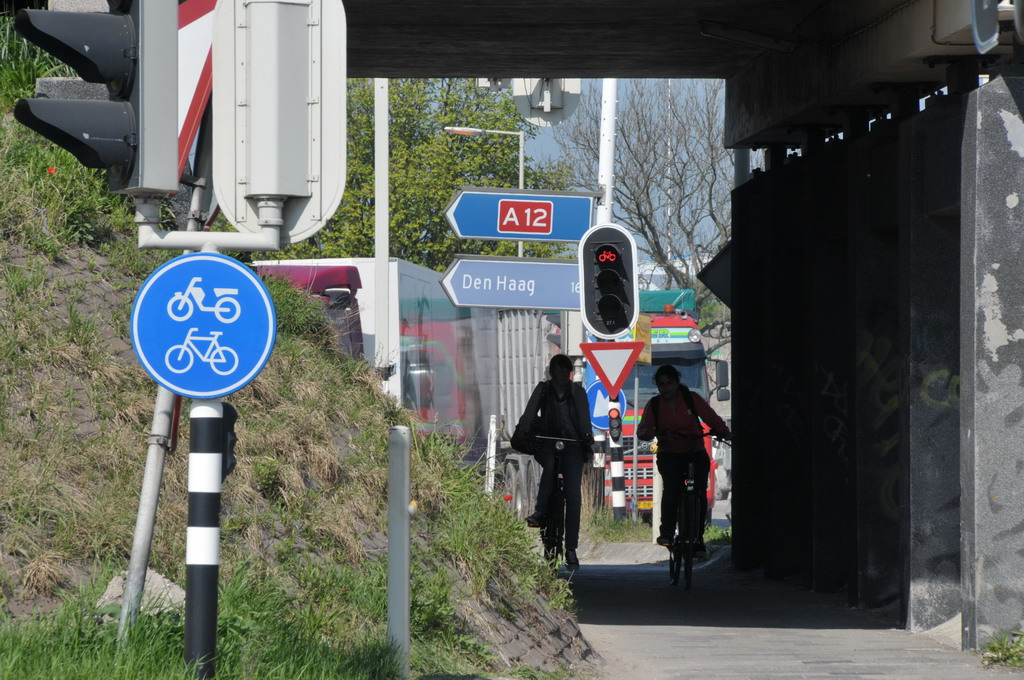 Eind april 2009 zijn de huidige aansluitingen van de N209 met de A12 (den Haag-Utrecht) vervangen door nieuwe waardoor de filedruk (vooral) richting de veiling zal afnemen omdat er door deze mega reconstructie eindelijk een ongelijkvloerse kruising met de trein Den Haag-Utrecht v.v. ontstaat. Er passeert elke 5 minuten een trein waardoor het verkeer -o.a. op de afritten van de A12- de laatste jaren meer stilstaat dan doorrijdt.